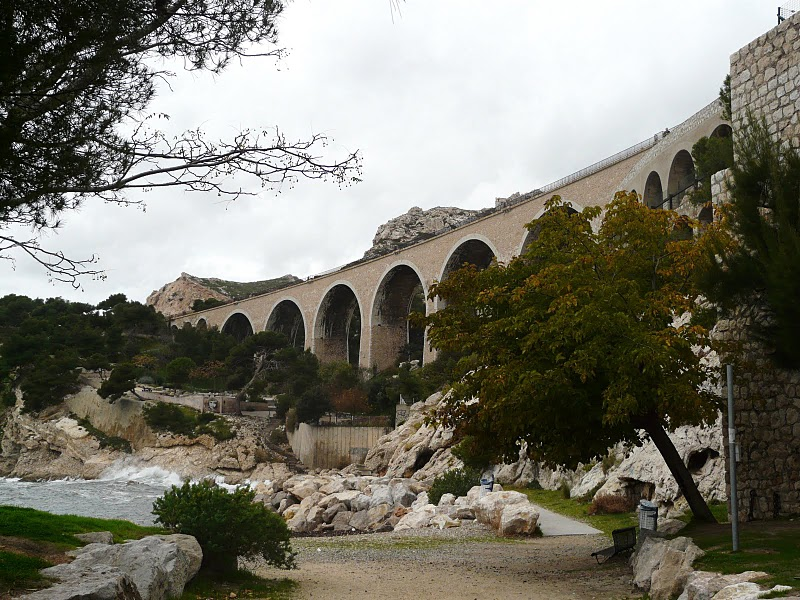 L'Estaque